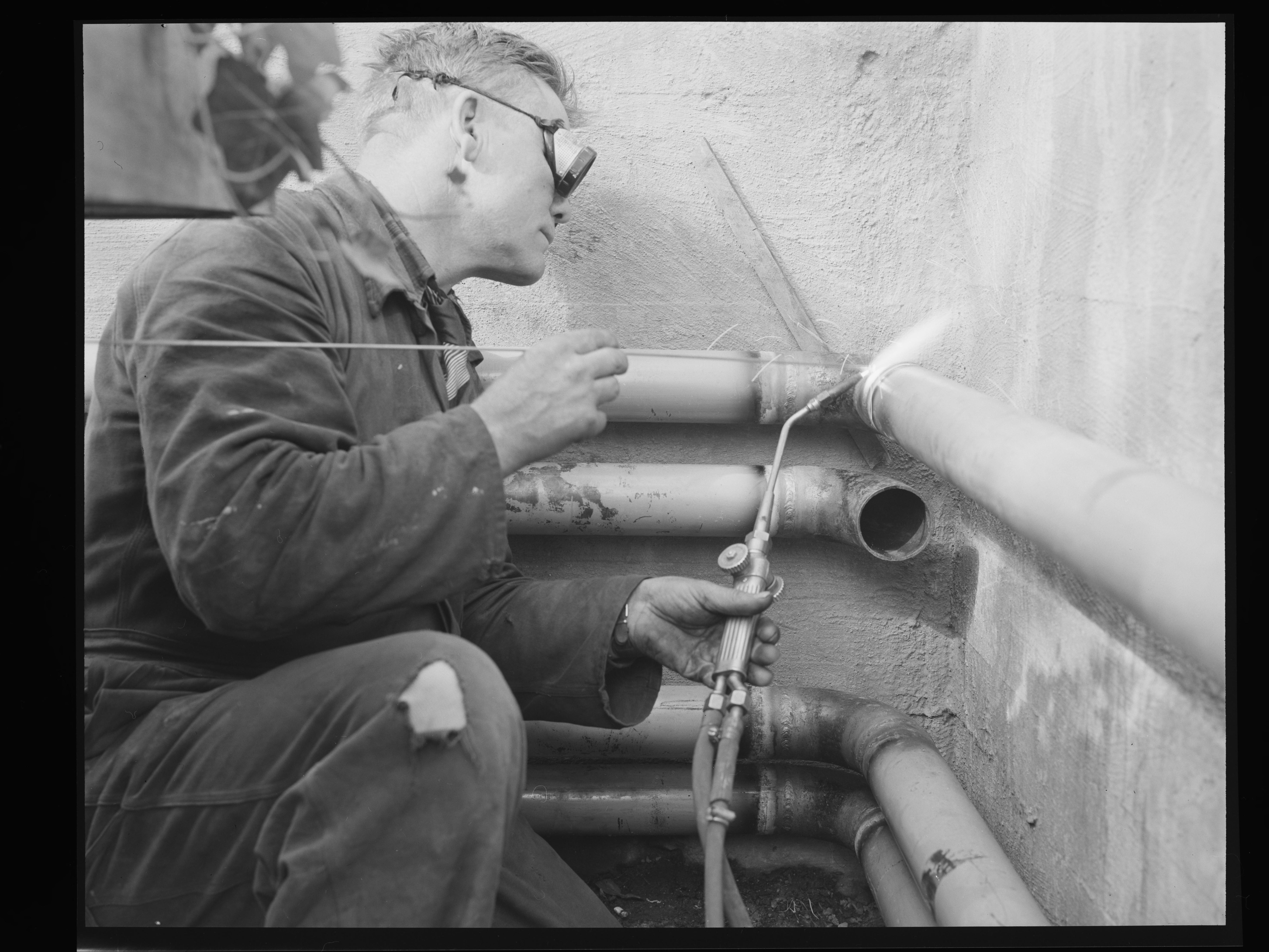 Bildet er hentet fra Nasjonalbibliotekets bildesamling